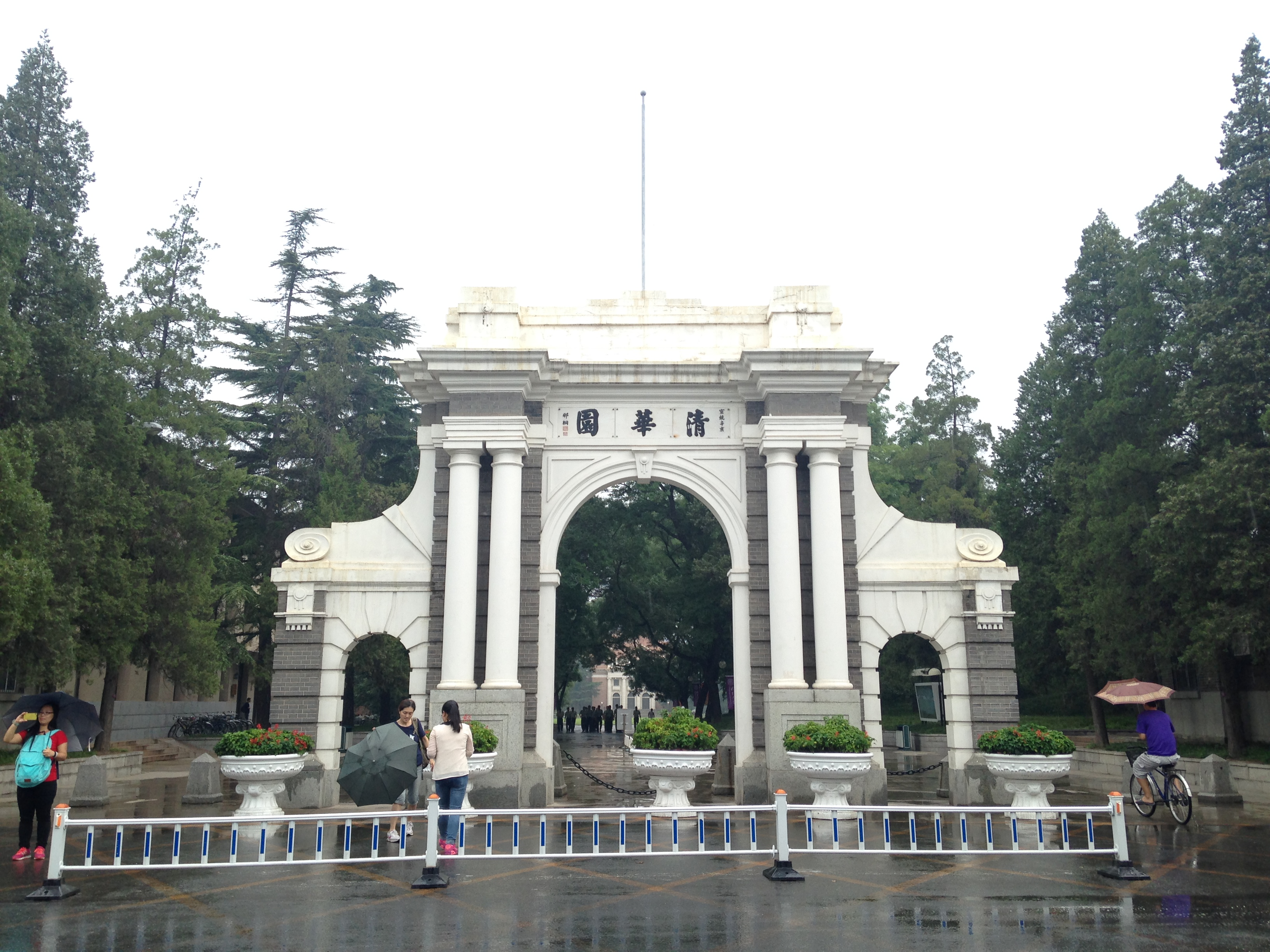 清華大学・旧校門